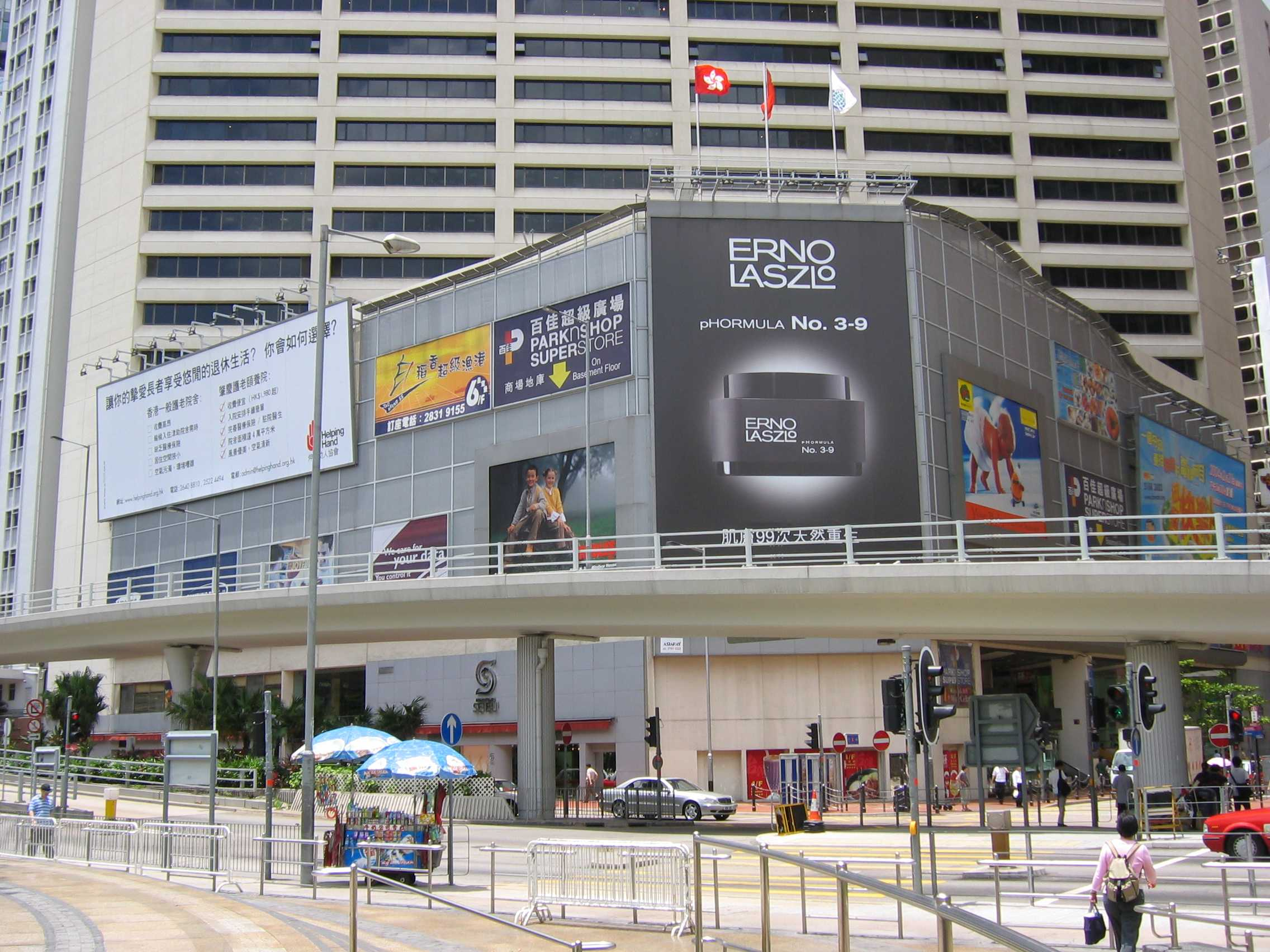 中文（香港）: 翻新前皇室堡外貌